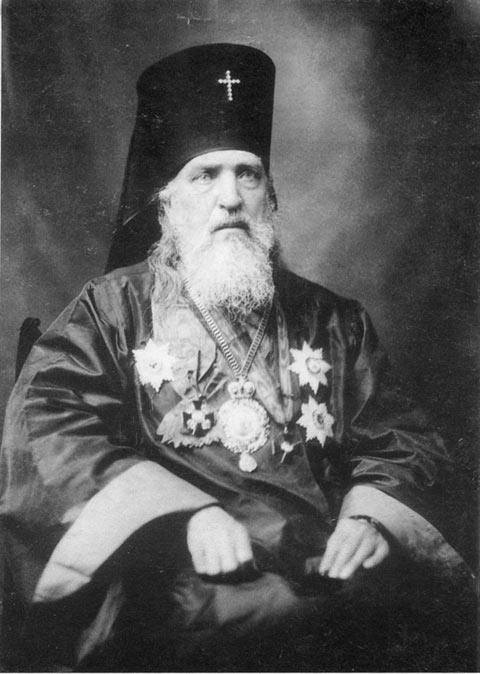 Святой равноапостольный Николай, архиепископ Японский